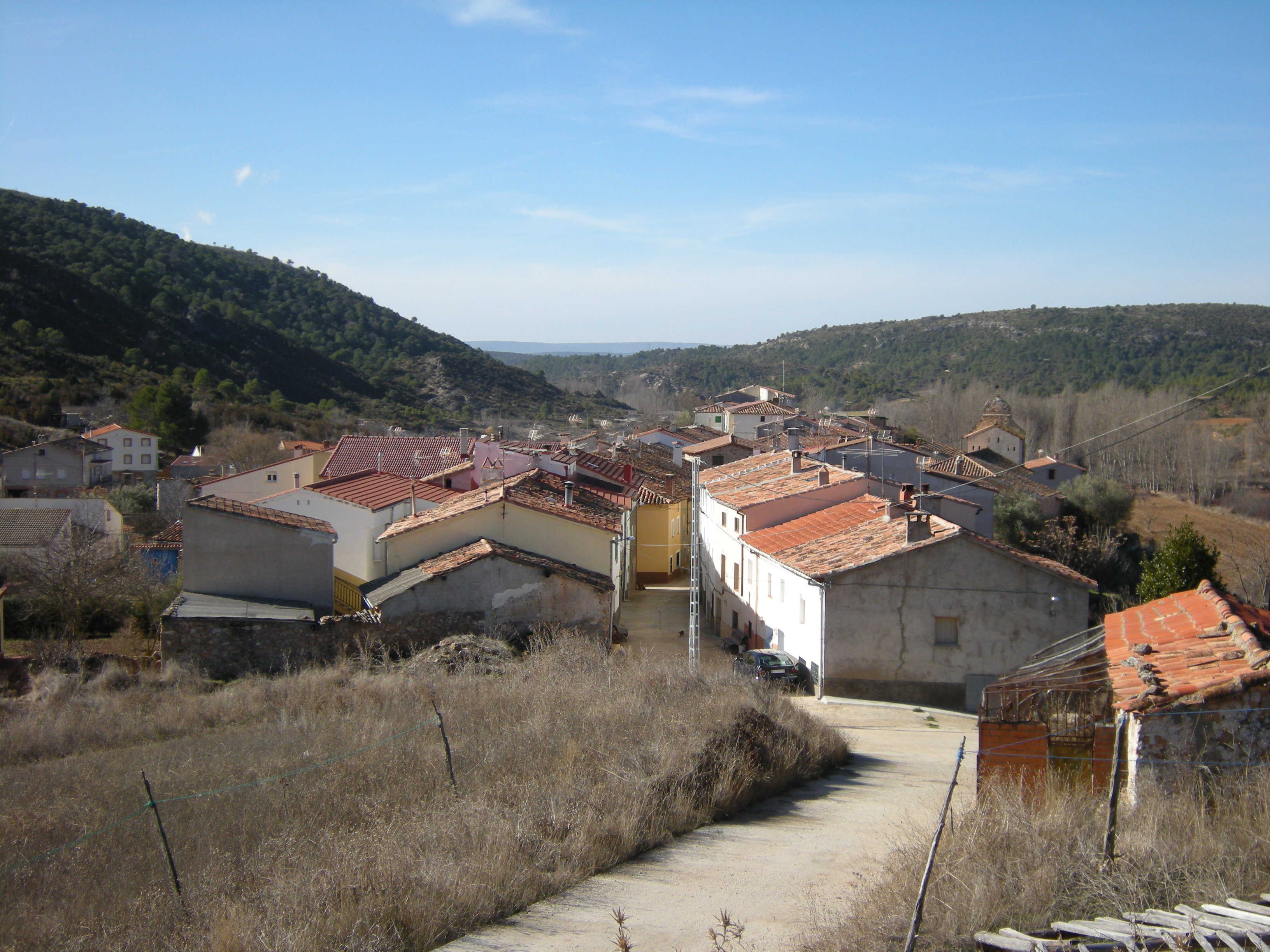 Panoramica de Huetos